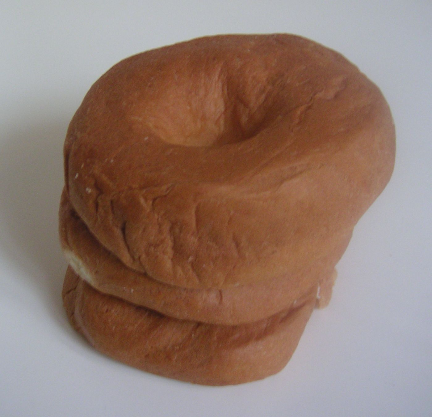 Galetes. Als forns les venen de vegades en bosses de plàstic transparent, apilades d'aquesta manera.